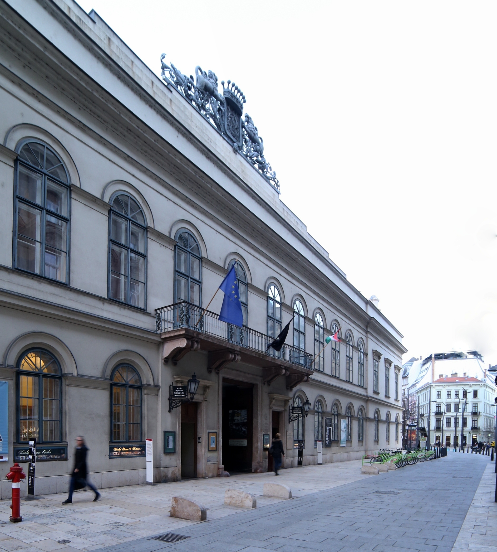 Károlyi-palota, klasszicista épület. Anton Pius Riegl és Hofrichter József, 1832. Cím: Károlyi utca 16., Ferenczy István utca 1., Henszlmann Imre utca 2.